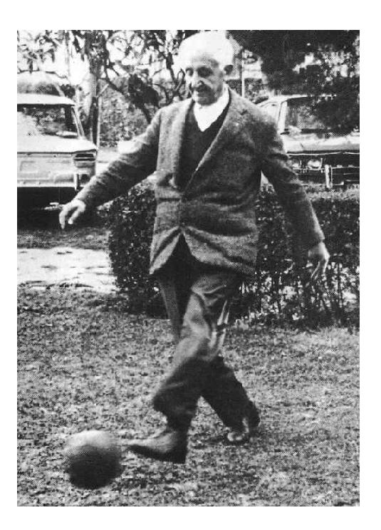 Es una foto del ex presidente radical Arturo Illia jugando al futbol.